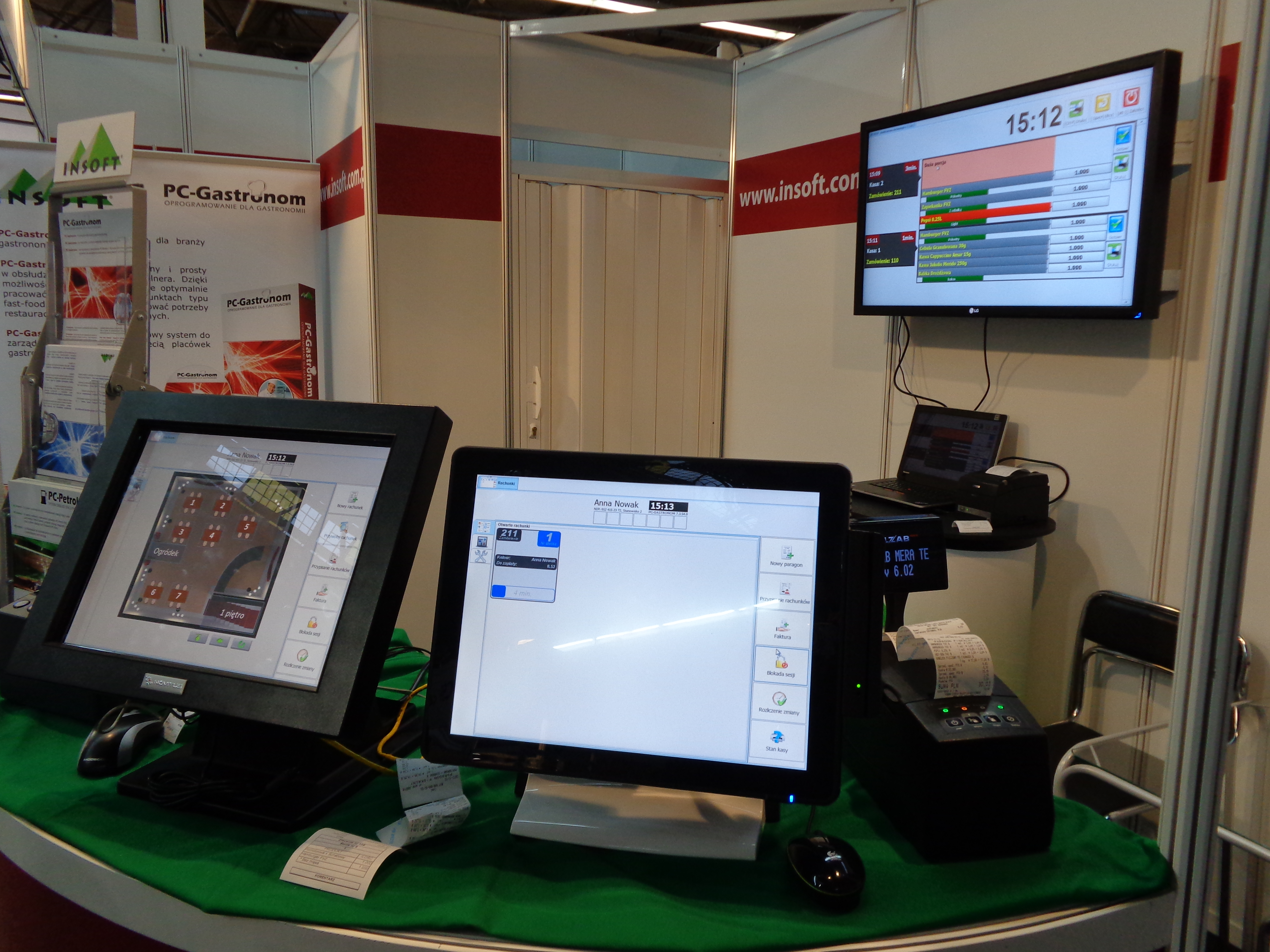 Terminale POS prezentowane podczas Targów HORECA 2013 w Krakowie.